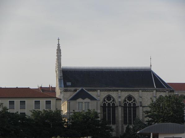 Chapelle de l'Institution des Chartreux à Lyon